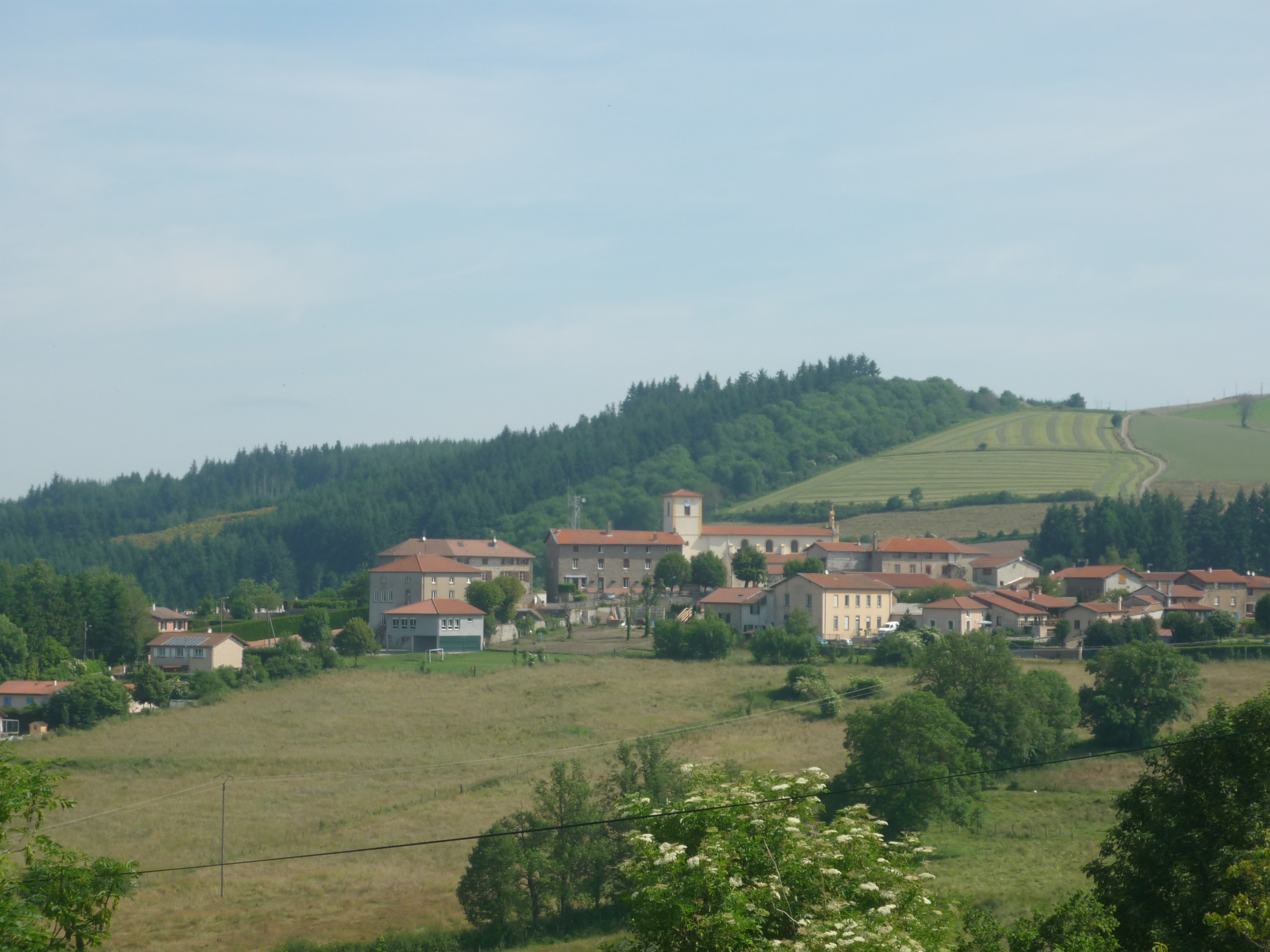 Vue générale du village des Sauvages, dans le département du Rhône en France.